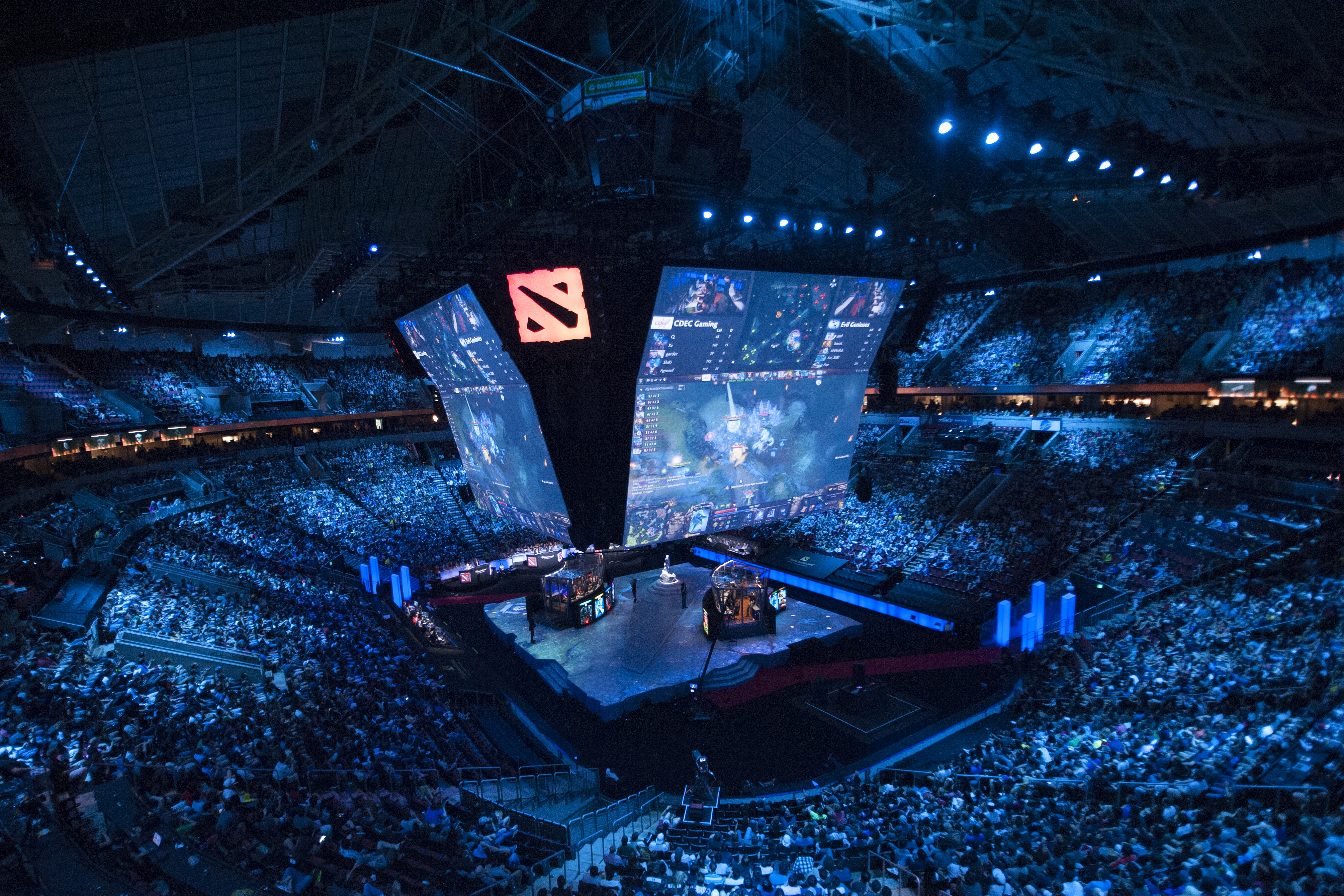 The International 2015 grand final.